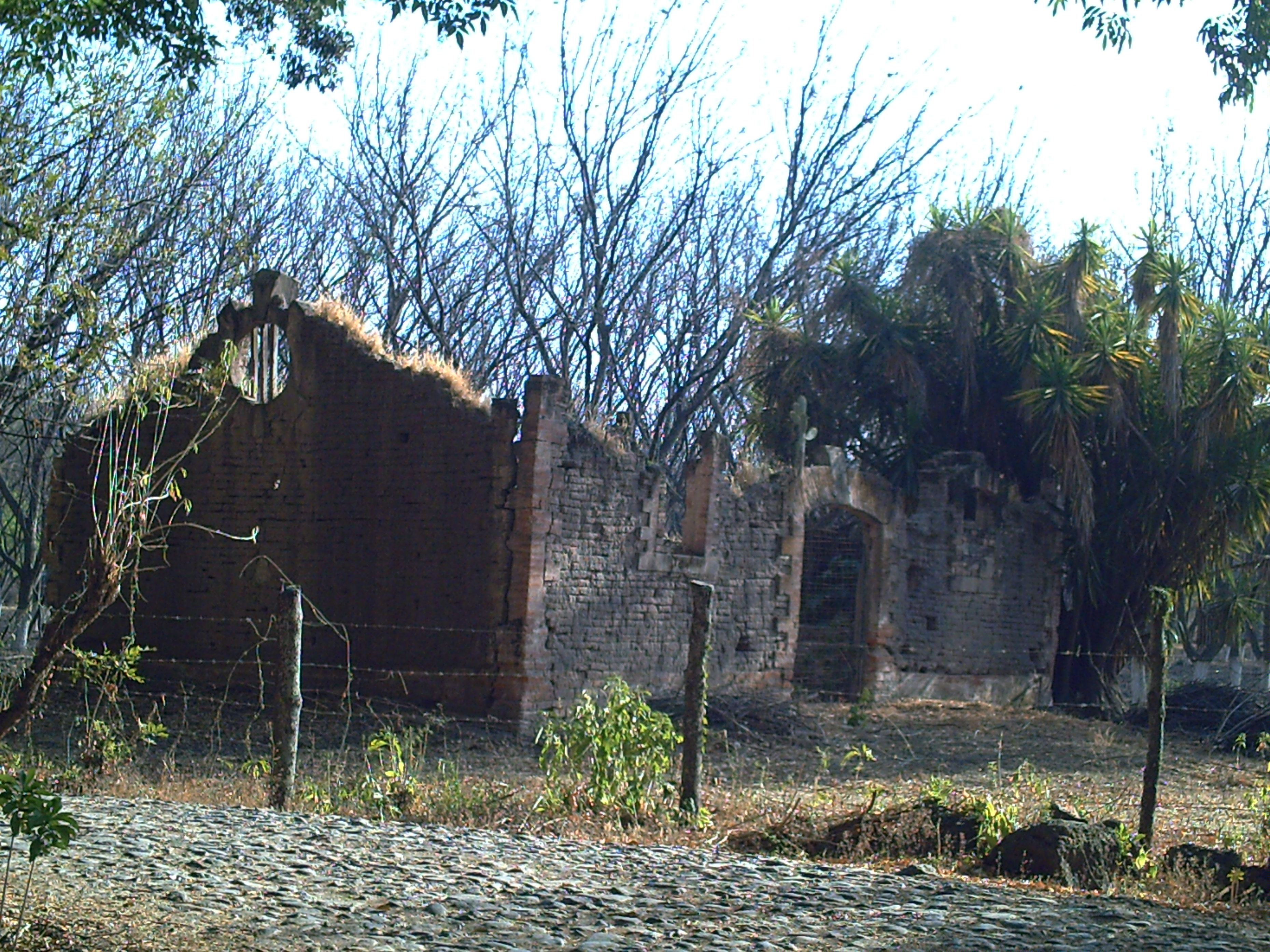 Construcción abandonada en Jalpa de Cánovas